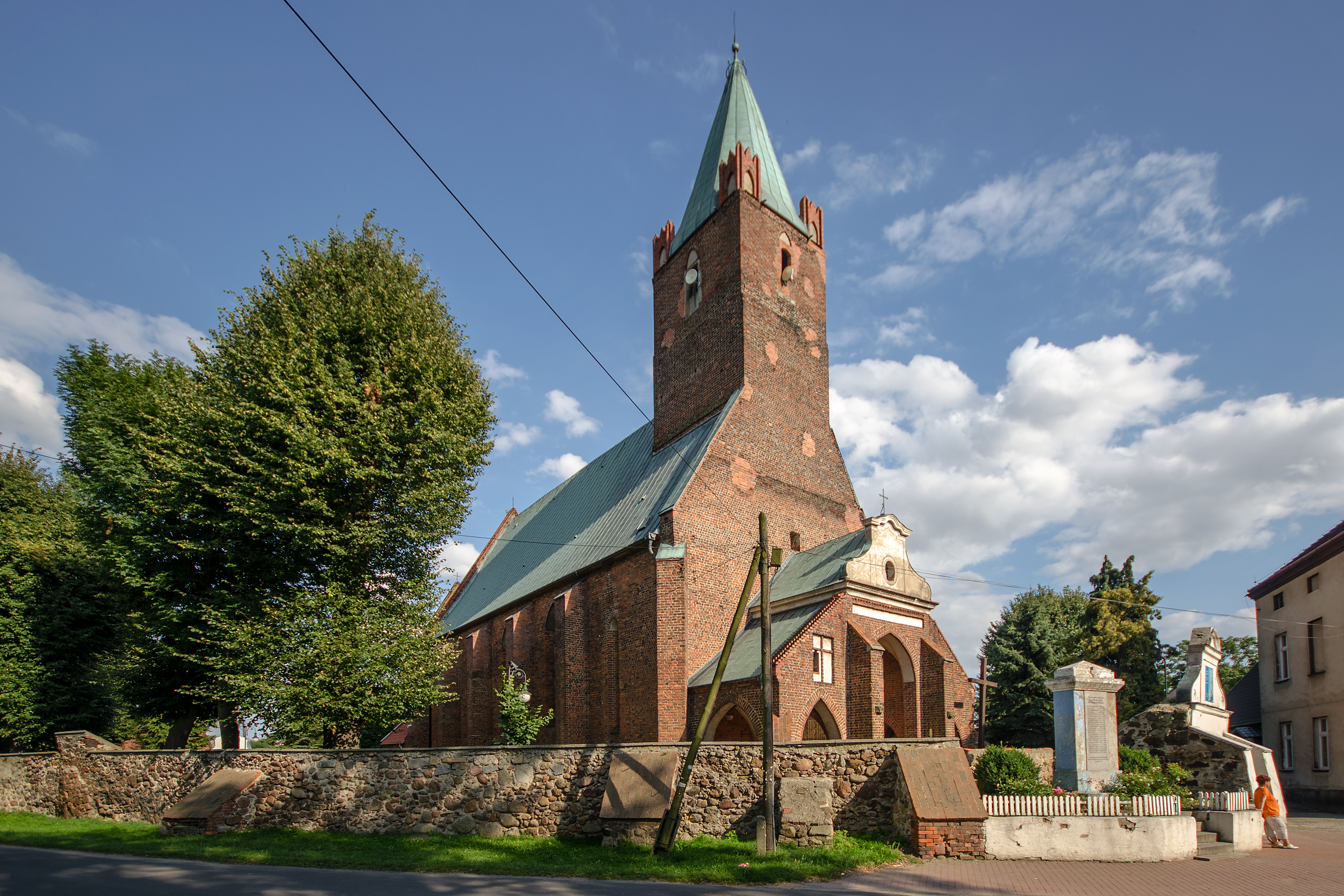 Małujowice, zespół kościoła par. p.w. św. Jakuba Apostoła